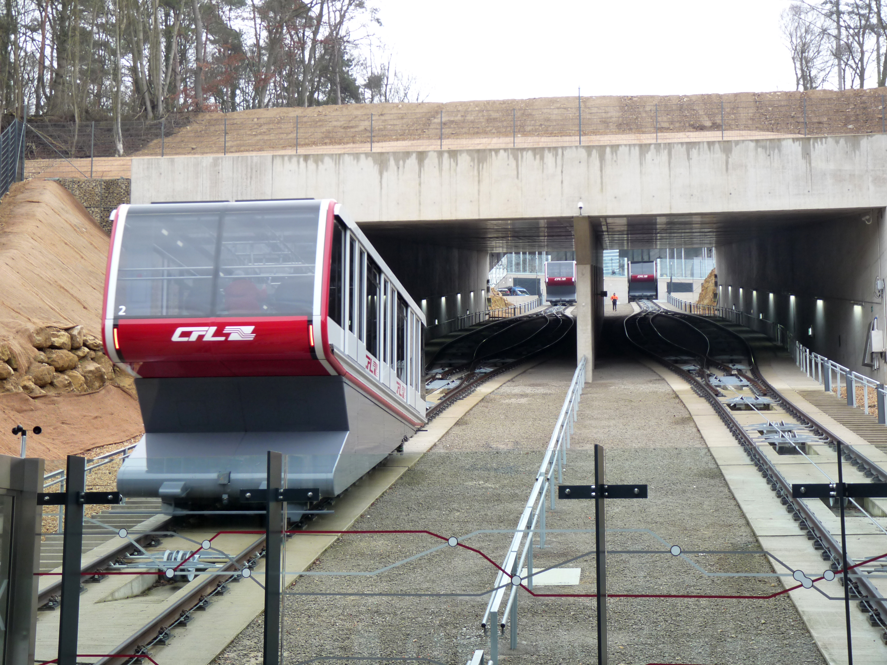 De kabelspoorbaan bij Pfaffenthal-Kirchberg